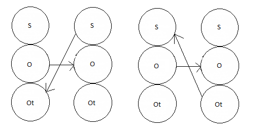 Križne transakcije